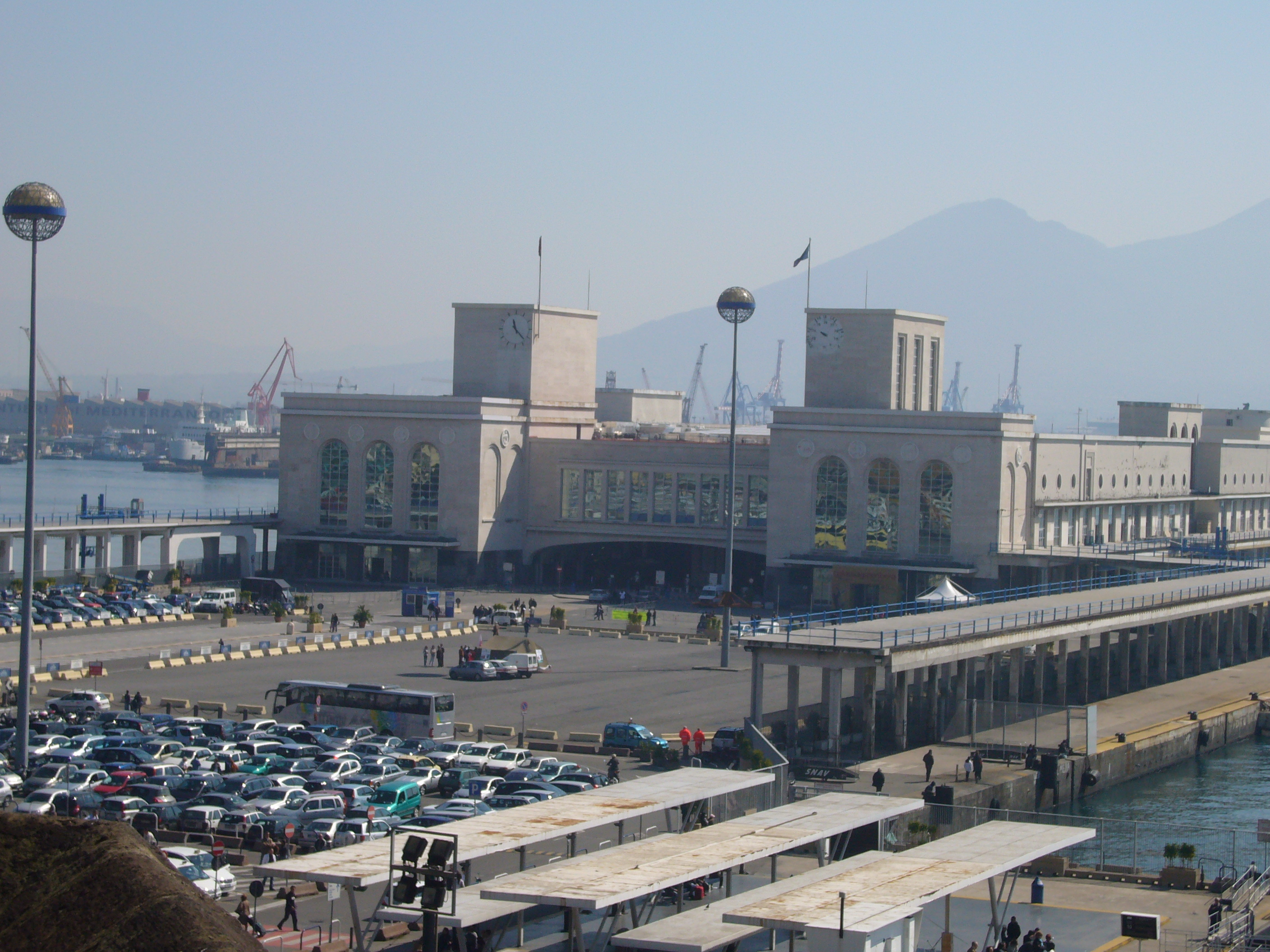 Napoli, Stazione marittima